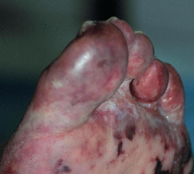 Плавољубичаста дерматоза стопала као поседица периферне емболизације изазване трбушном анеуризмом аорте. др М.Димић, Ниш, 2009.